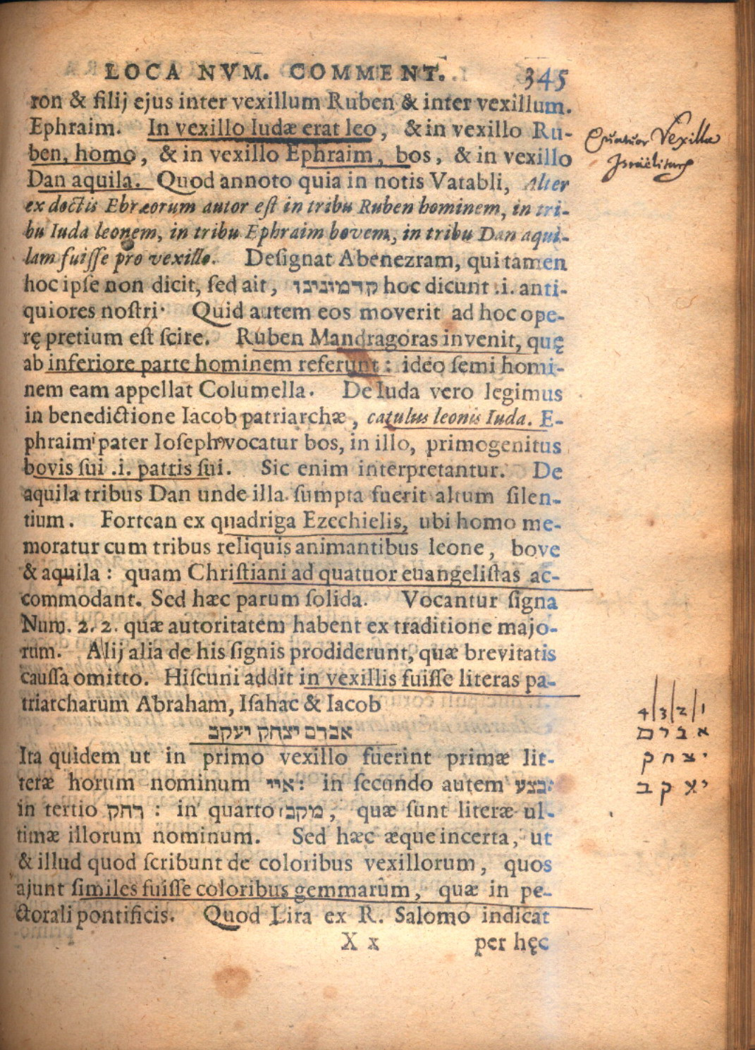 Egy oldal Drusius Loca difficiliora című munkájából, Schickard saját kezű jegyzeteivel, számításaival